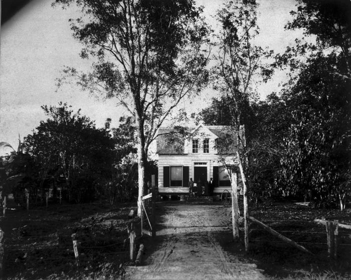 Foto. De boerderij van de boerenkolonisten familie Tammenga (Taminga, Tamminga) aan de Gemeene Landweg.